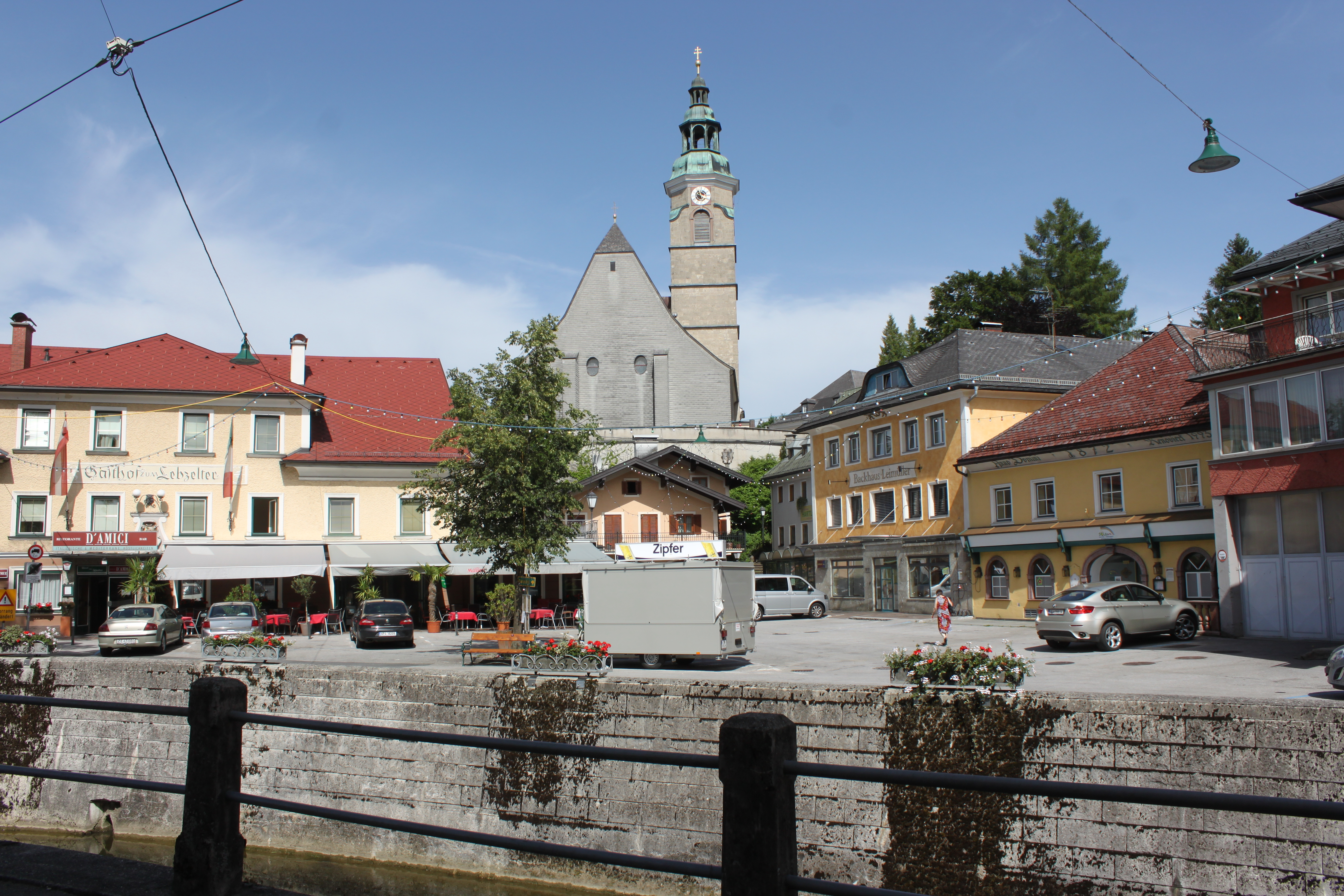 Kath. Pfarrkirche hl. Martin in Straßwalchen, davor der Marktplatz, davor der Hainbach zum Schwemmbach.